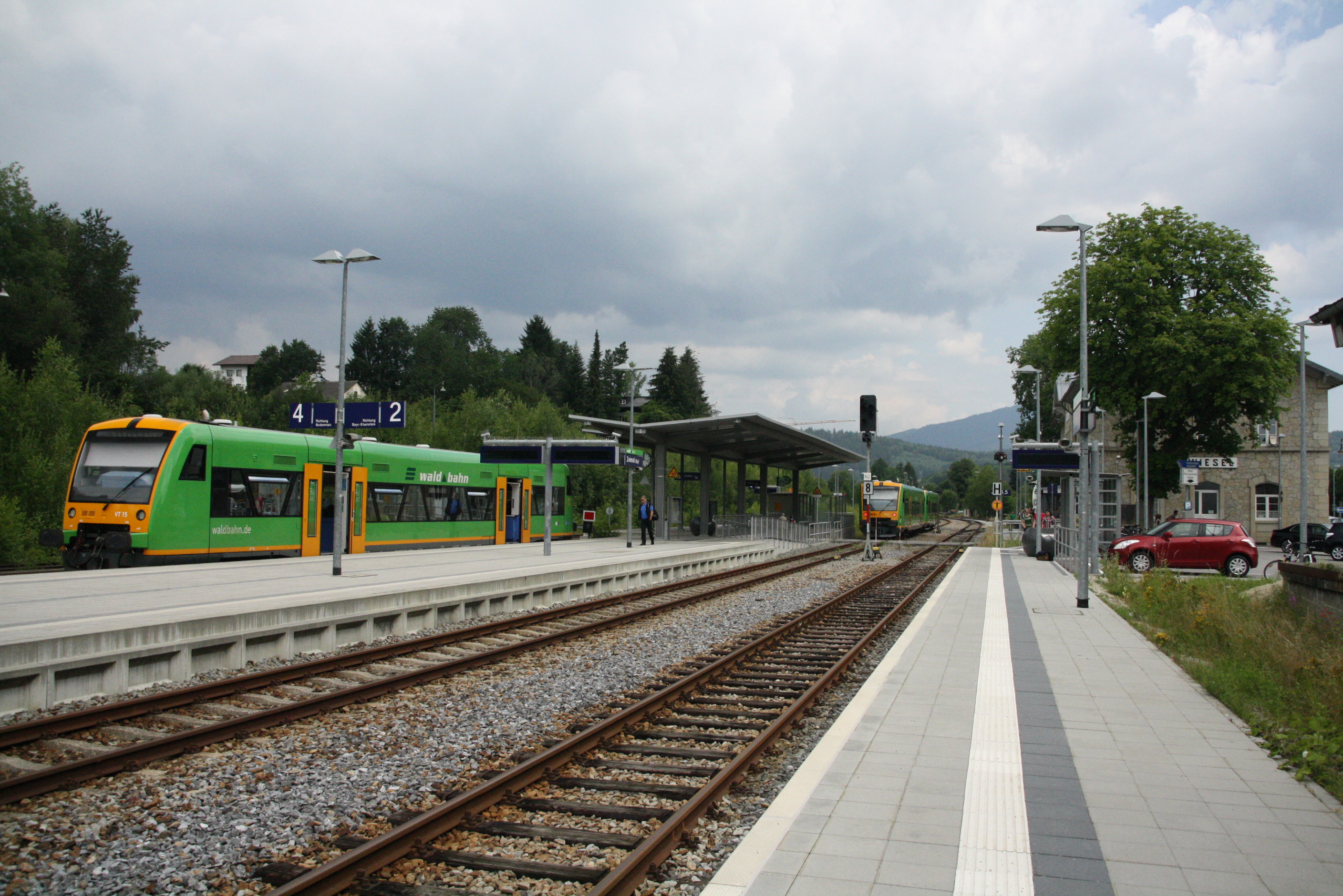 Der Bahnhof Zwiesel (Bay) im Jahr 2016.